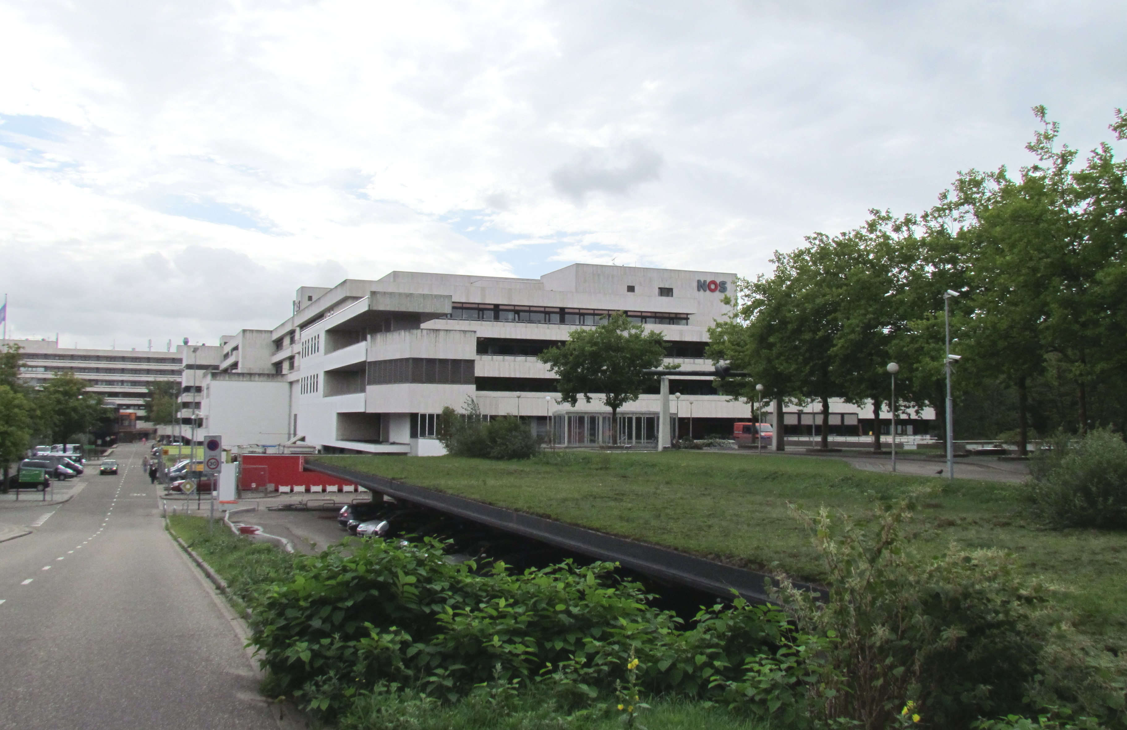 Gebouw van de NOS op het Media Park in Hilversum